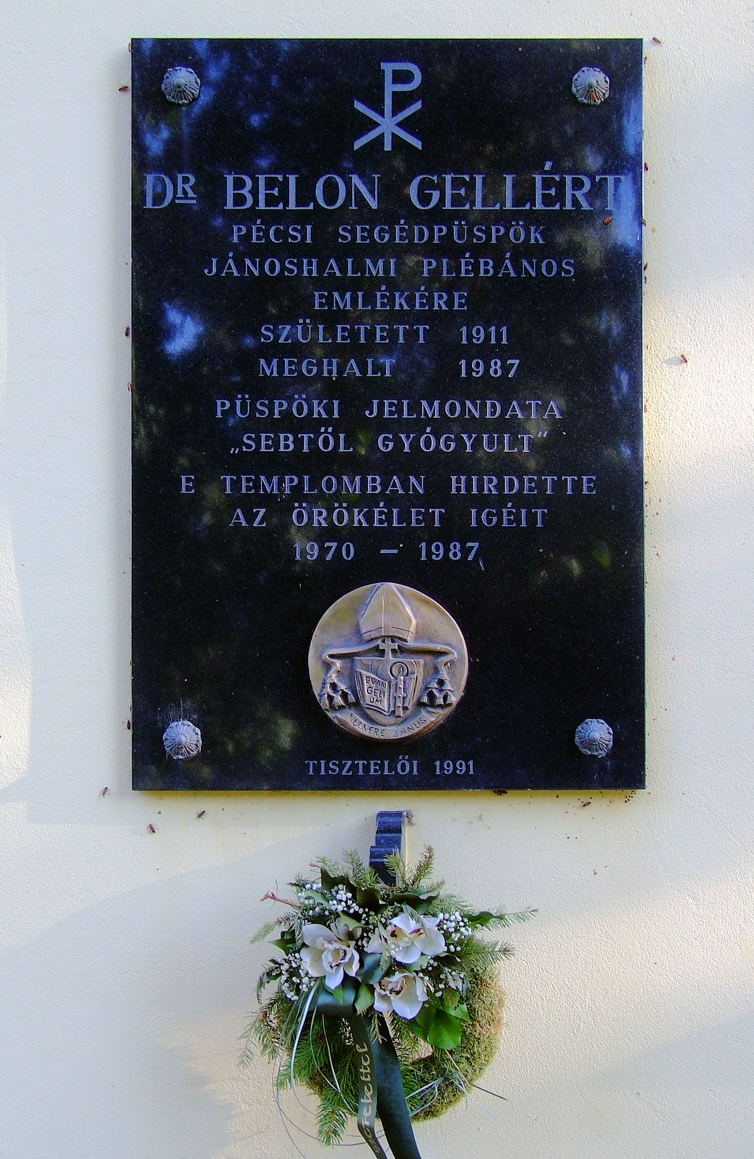 Belon Gellért-emléktábla a jánoshalmi Szent Anna-templom északi falán